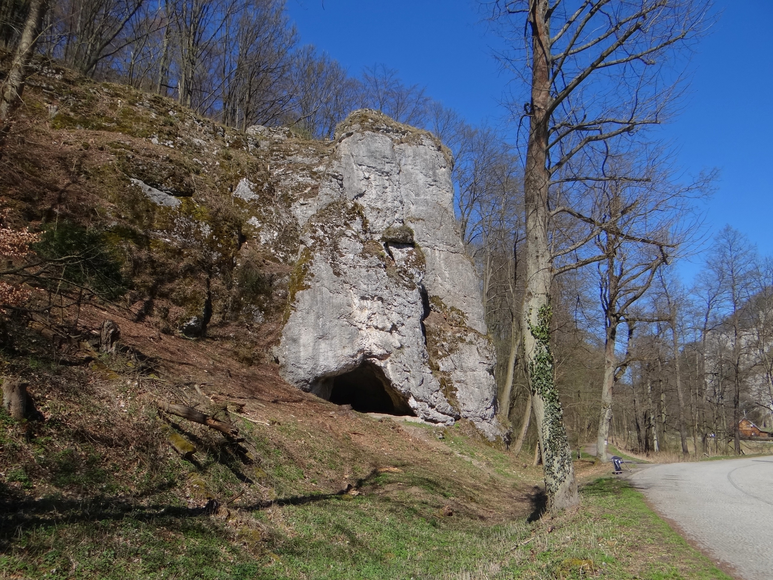 Schronisko Krowie (Jaskinia Krowia) w Ojcowskim Parku Narodowym